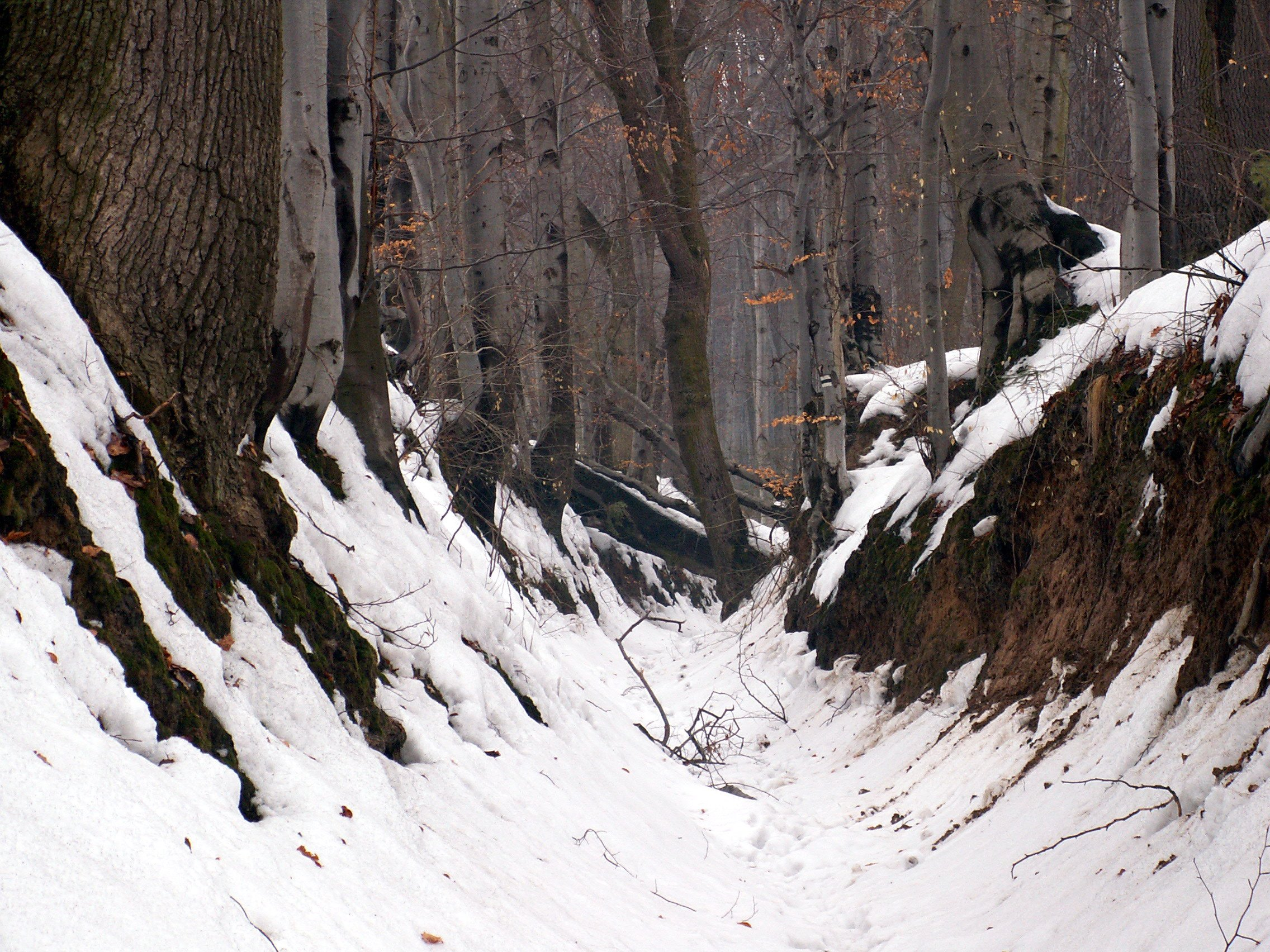 Barania Góra reserve in Świętokrzyskie Mountains (Poland)